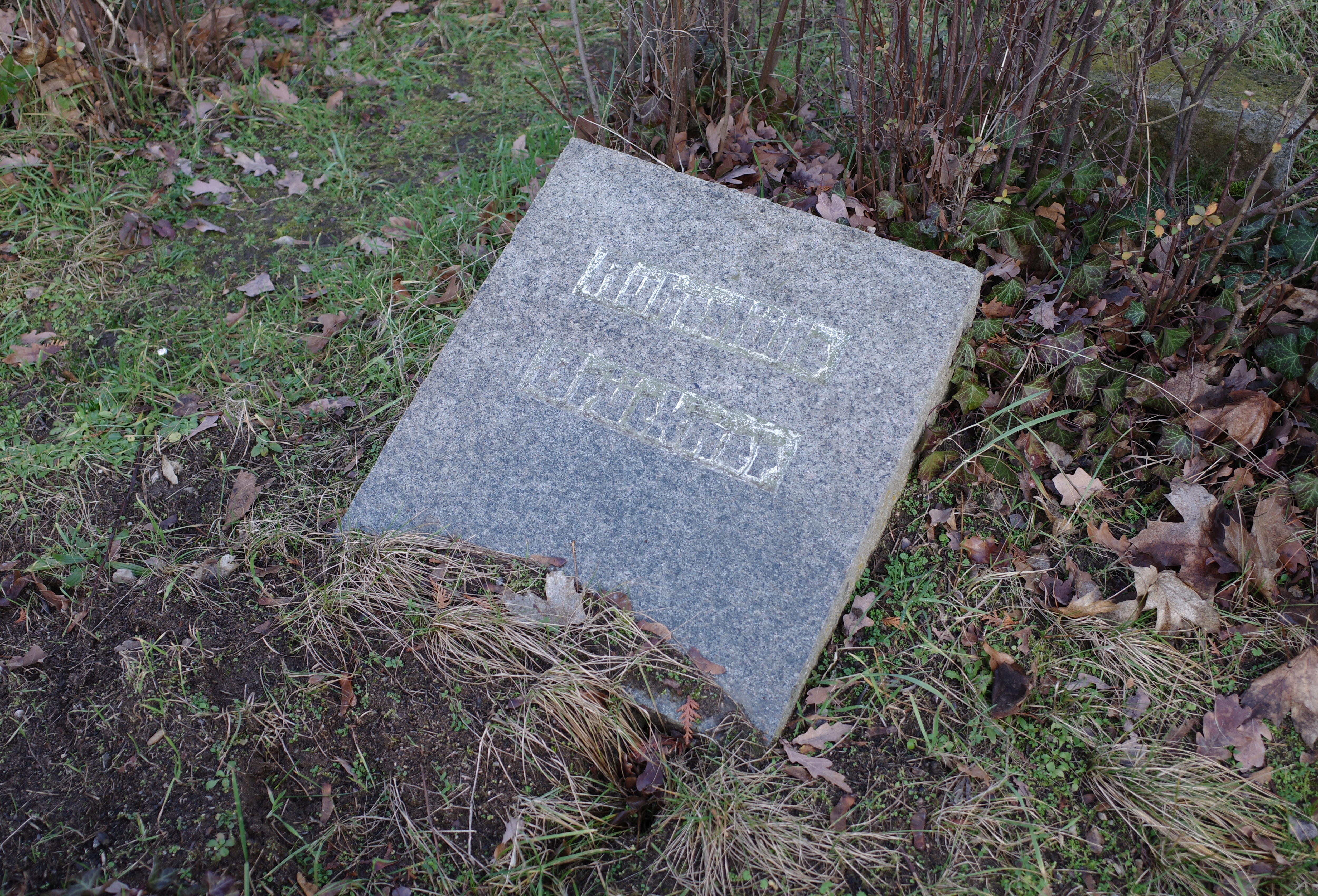 Dessau, Friedhof 3. Ruhestätte von Familie Brückner.